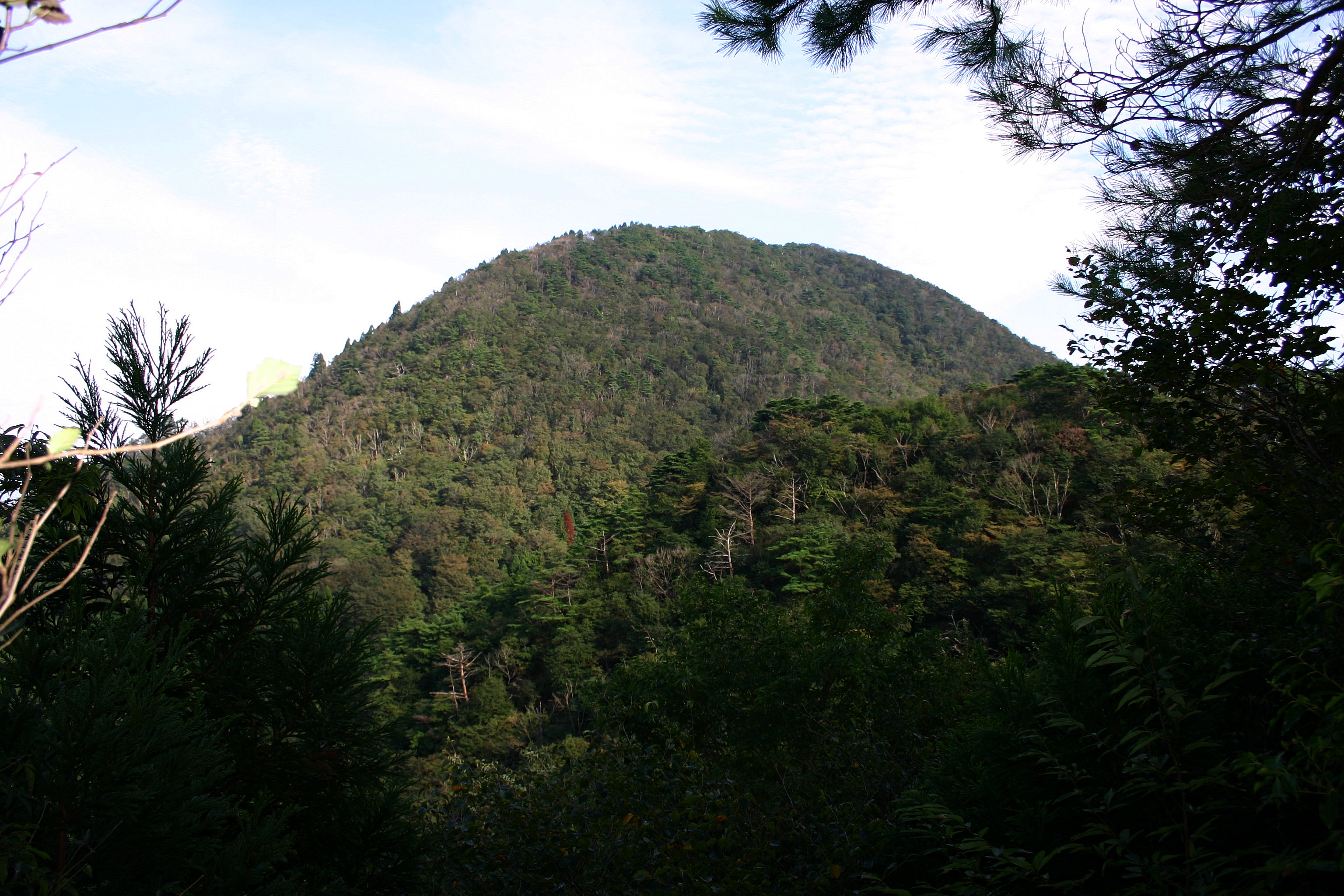 北西稜線の登山道から見た多田ヶ岳